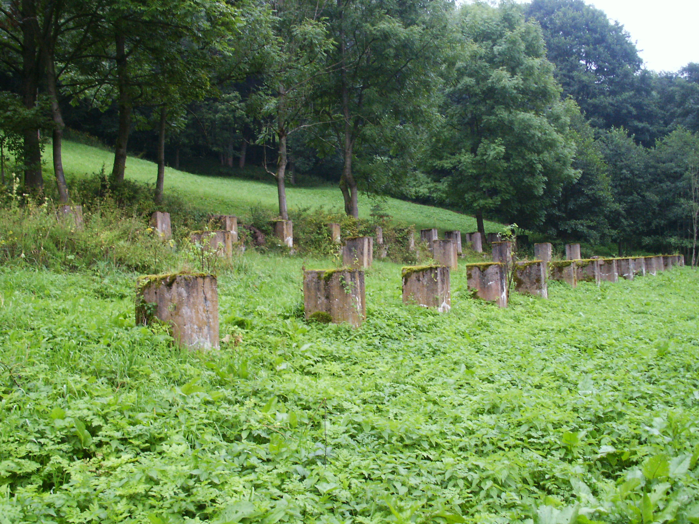 Sklenářovice - zbytky hospodářské stavby